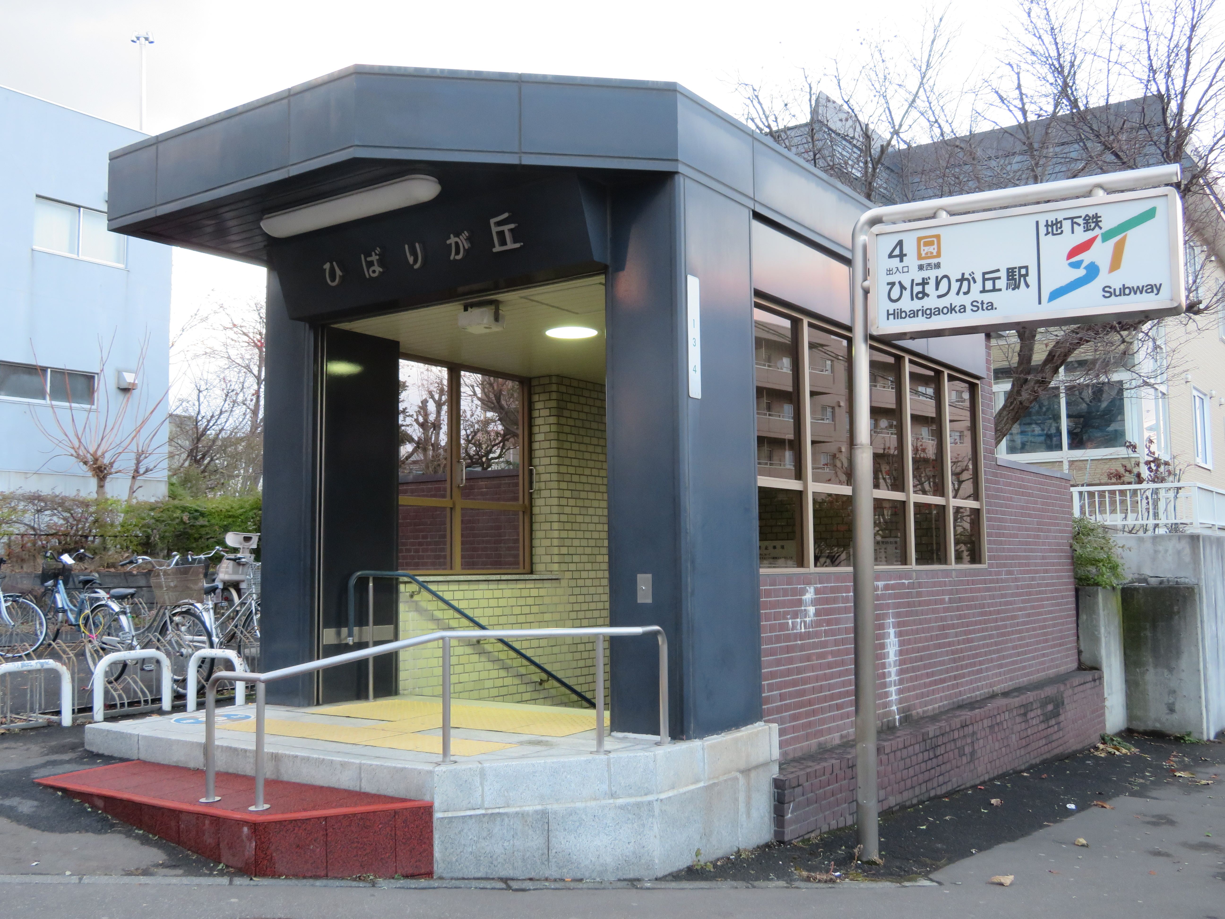 ひばりが丘駅4番出入口